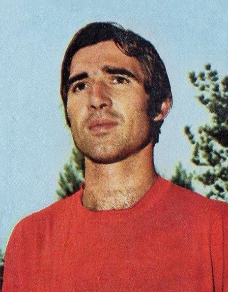 MONACO/MUNCHEN 74-PANINI-Figurina n.262- DIMITROV - BULGARIA